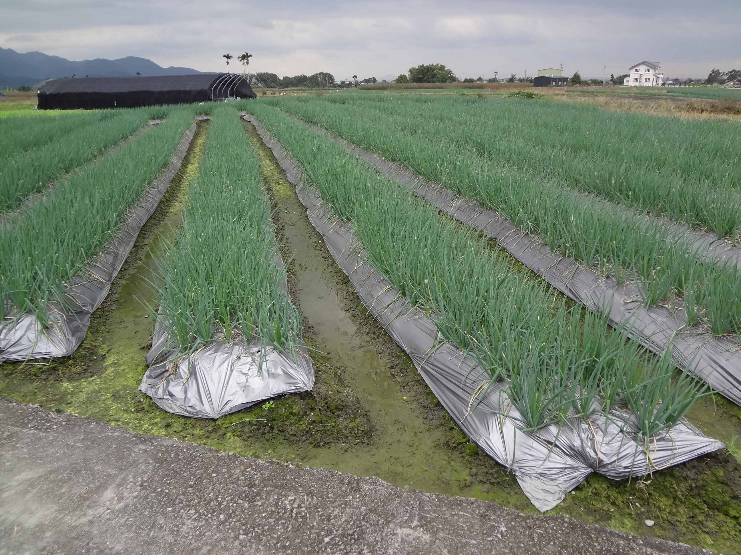 宜蘭縣三星鄉天福村東興路的三星蔥田。